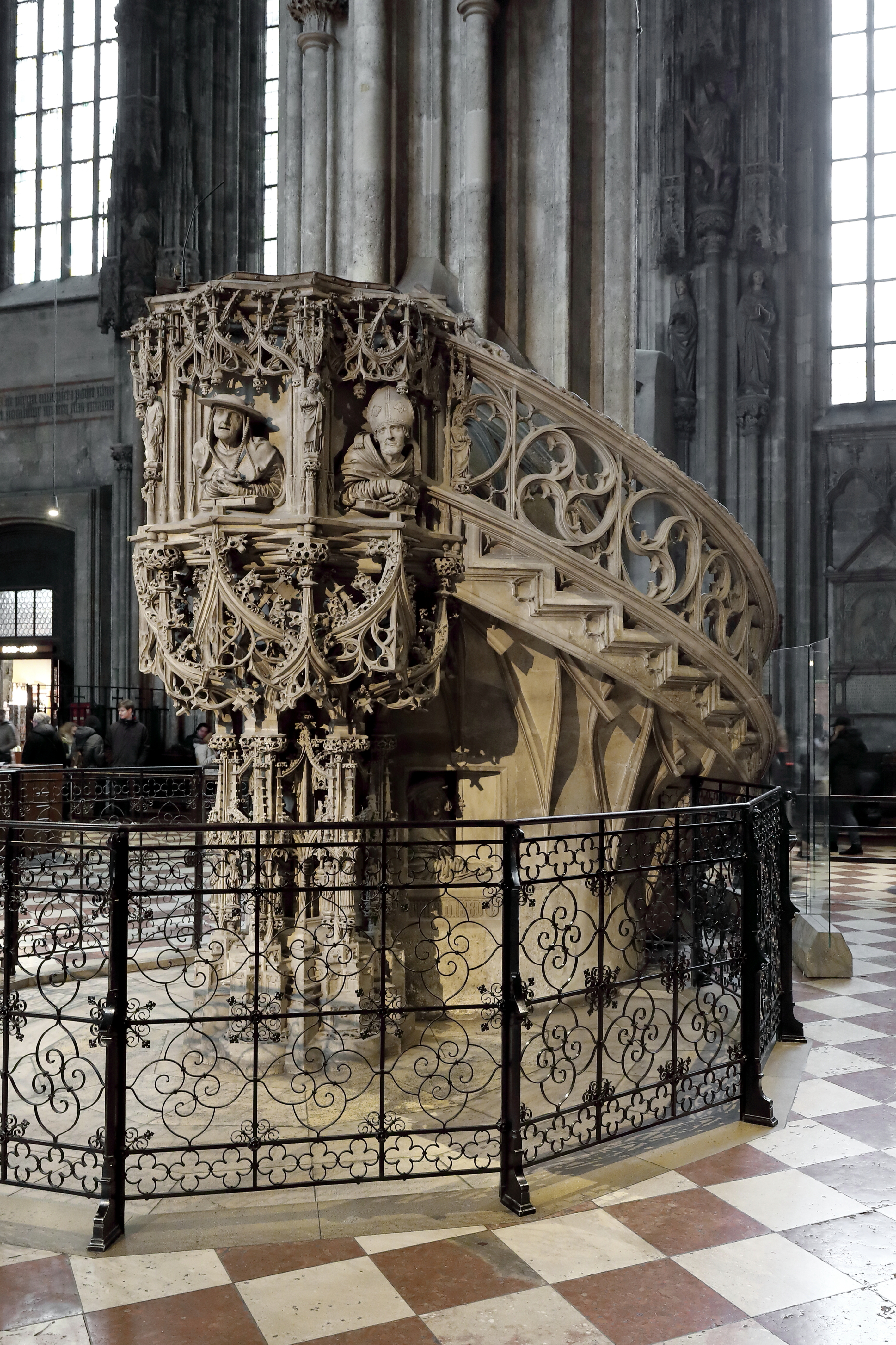 Die Domkanzel des Stephansdoms in der österreichischen Bundeshauptstadt Wien.Die aus 3 Sandsteinblöcken bestehende Domkanzel wird Anton Pilgram zugeschrieben und wurde um 1510 vollendet. Am Kanzelkorb sind die 4 Heiligen und Kirchenväter Augustinus mit Mitra, Gregor der Große mit Papstkrone, Hieronymus mit Kardinalshut und Ambrosius mit Mitra dargestellt (v.l.n.r.).